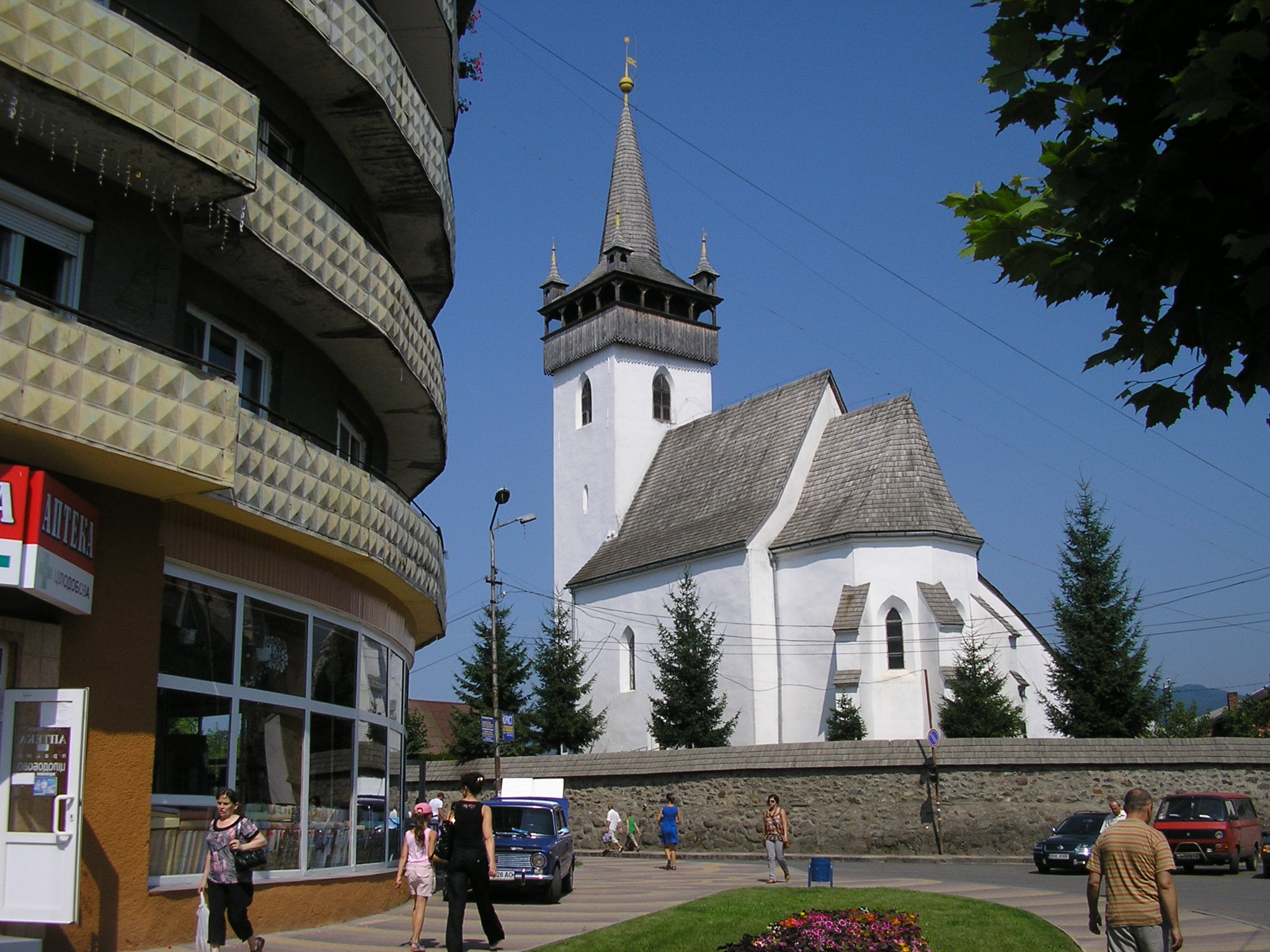 Хуст, Лютеранский храм св. Елизаветы, Закарпатье, 2010